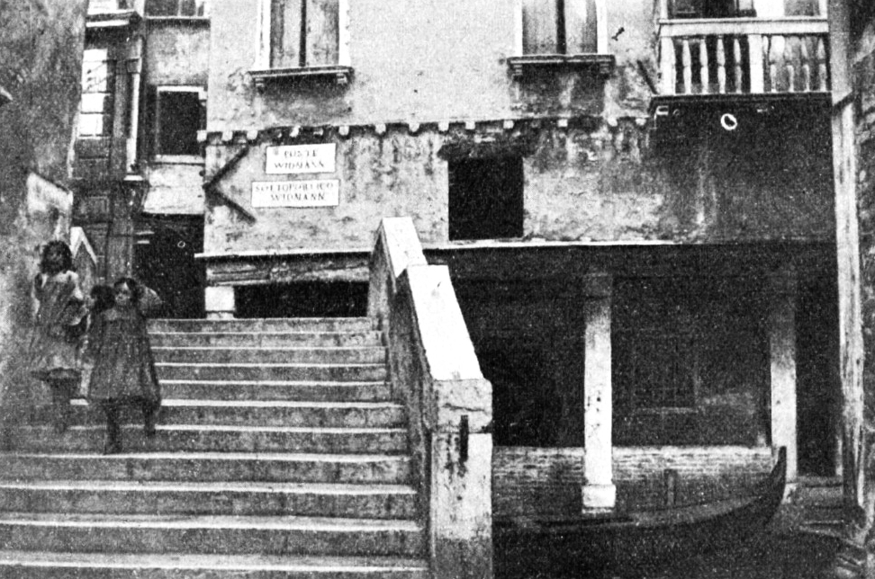 Nach dem Schriftsteller Josef Viktor Widmann (1842–1911) benannter Ponte Widmann (Widmann-Brücke) und Sotoportego Widmann in Venedig, Blick von der Calle Larga Widmann